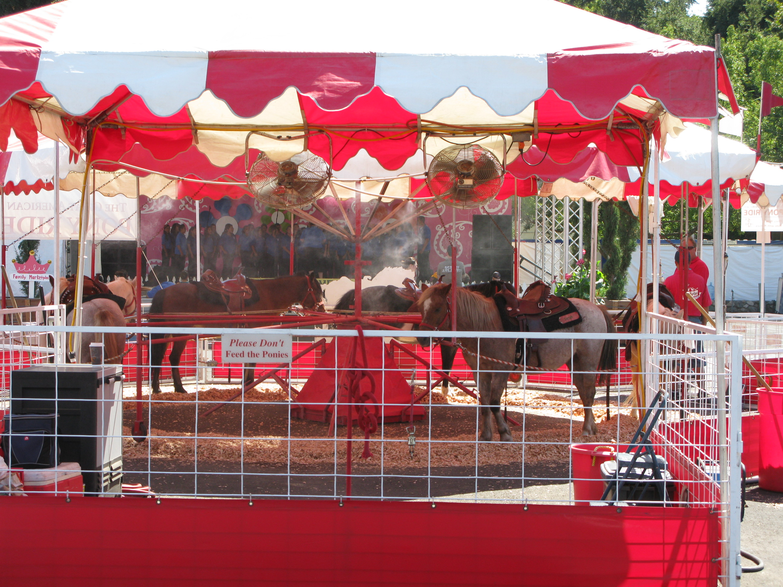 Ponies at a carnival pony ride